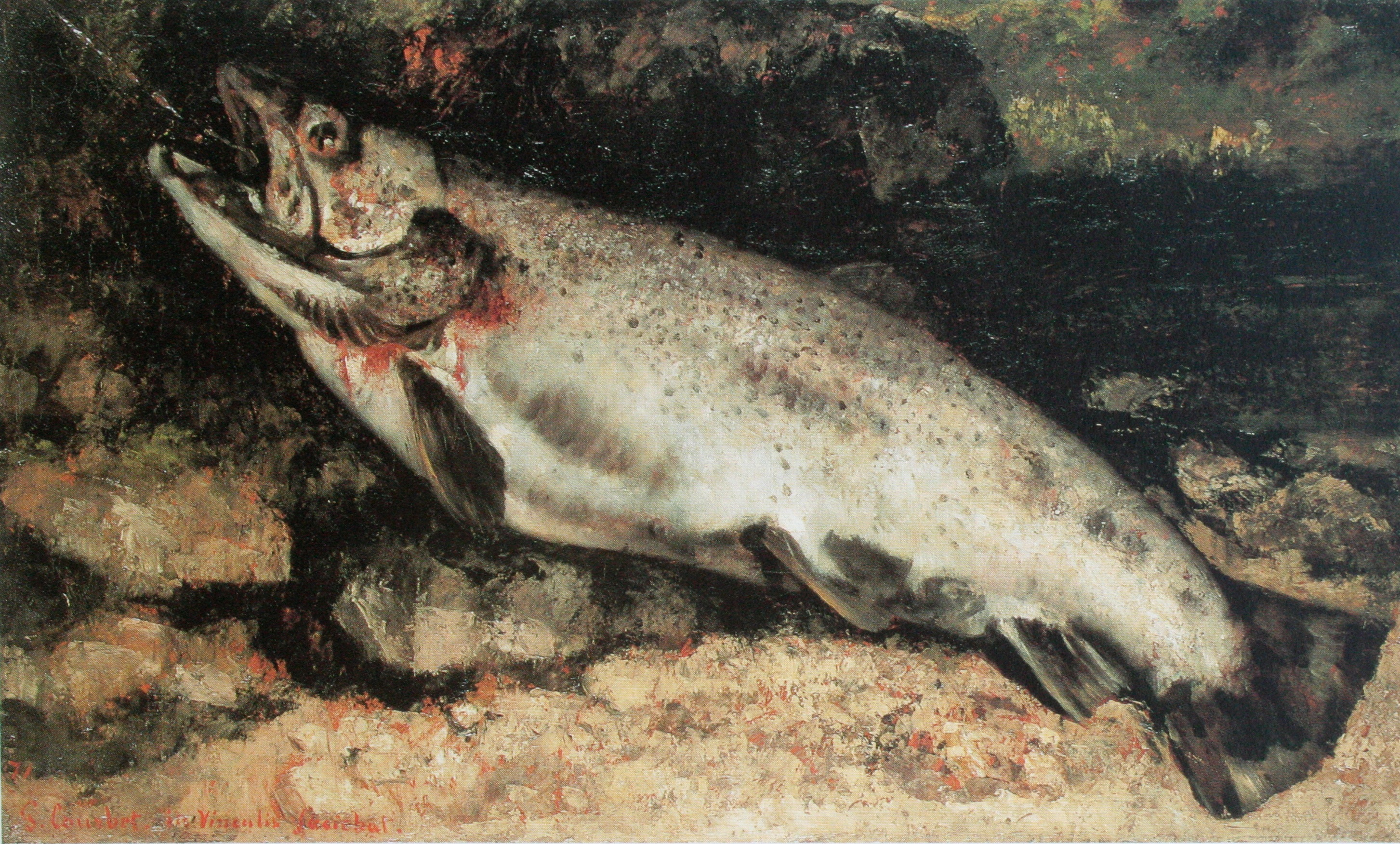 Die Forelle, Gemälde von Gustave Courbet, 1871, 52.5 x 87, Privatbesitz